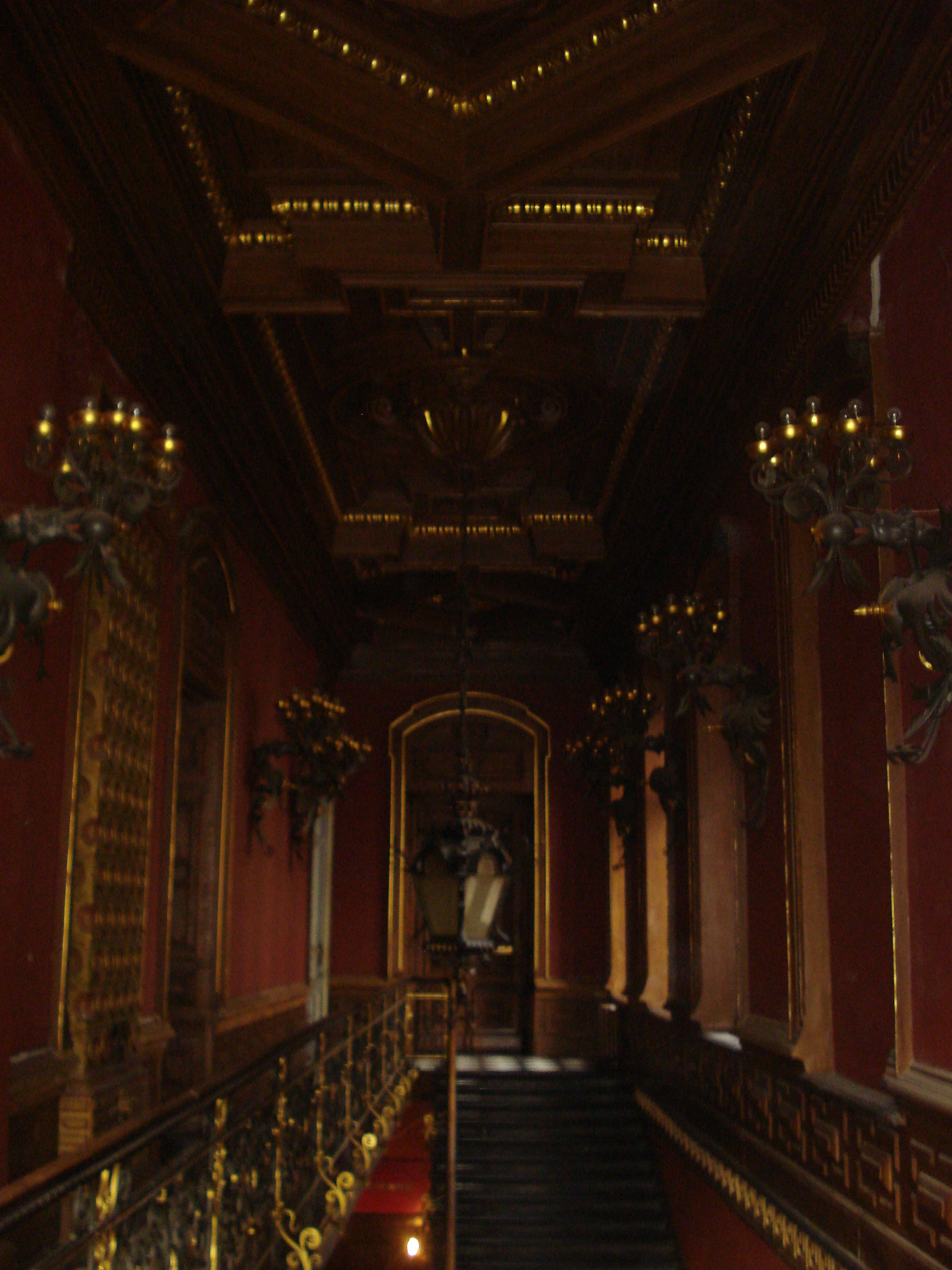 Лестница во дворце Союза писателей Литвы. Вильнюс